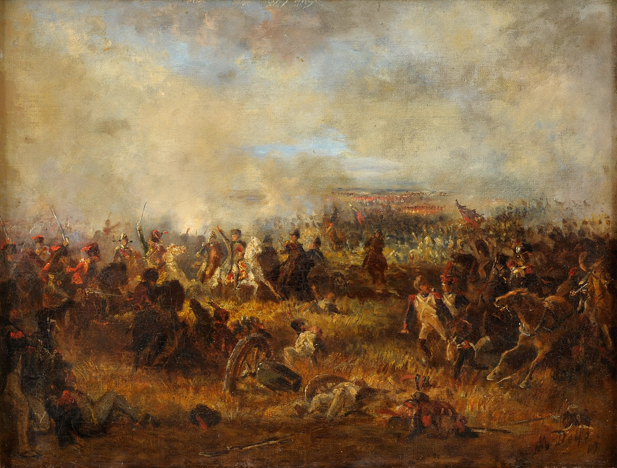 Napoleonische Schlachtenszene. Signiert. Öl auf Leinwand, 42 x 55 cm.